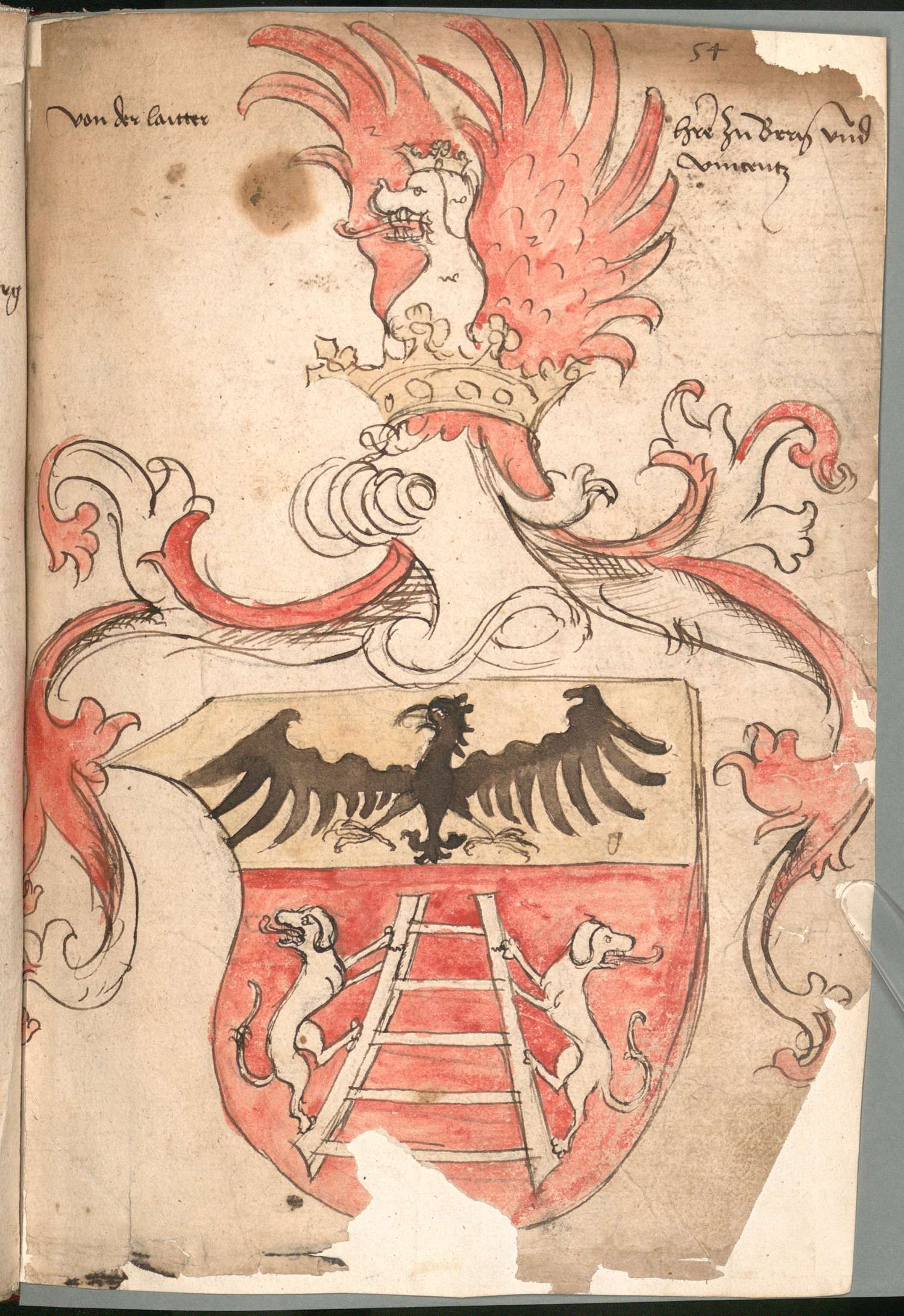 „Wernigeroder (Schaffhausensches) Wappenbuch“; Süddeutschland 4. Viertel 15. Jh. Bayerische Staatsbibliothek München, Cod.icon. 308 n